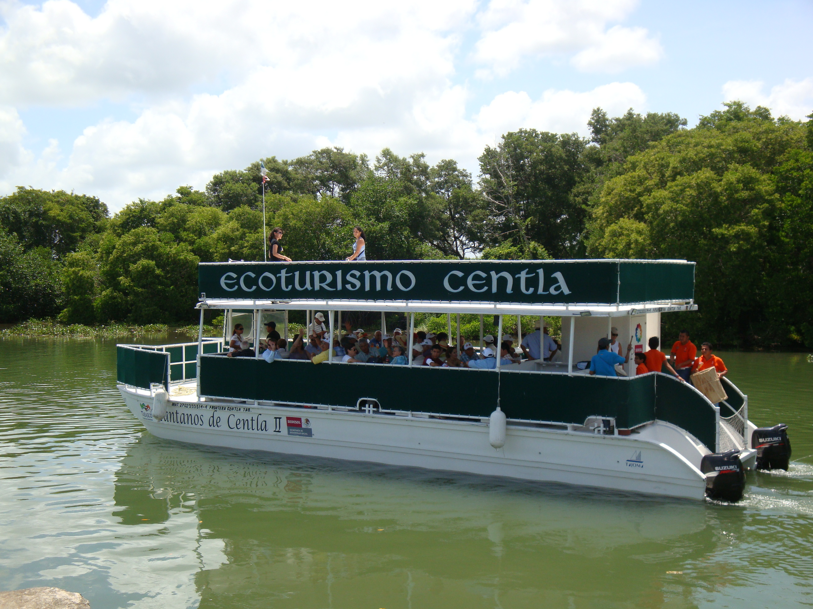 Catamarán turístico en la reserva de la biósfera "Pantanos de Centla", estado mexicano de Tabasco. Estos catamaranes se toman en el puerto de Frontera y hacen el recorrido turístico hasta la estación "Tres Brazos" en los pantanos de Centla.